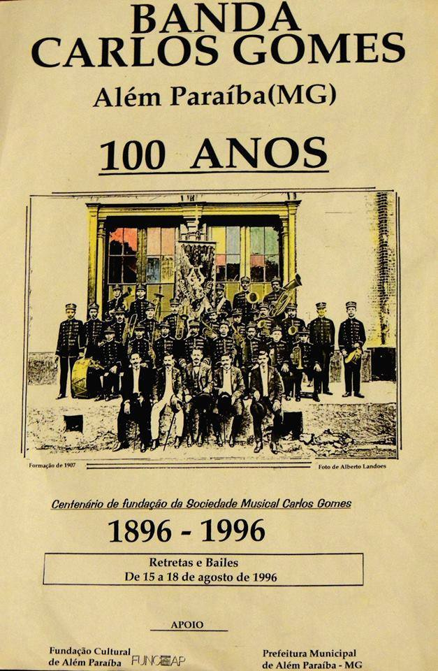 Folder comemorativo editado por Carlos Torres Moura.